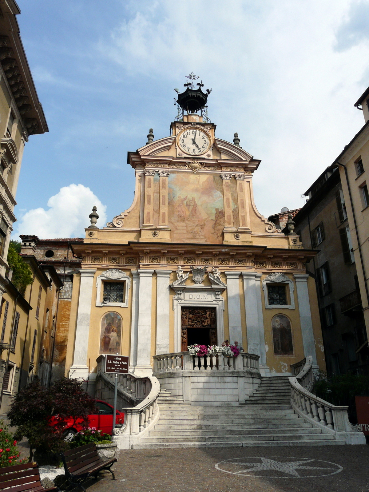 La chiesa dei Santi Pietro e Paolo, Mondovì, Piemonte, Italia